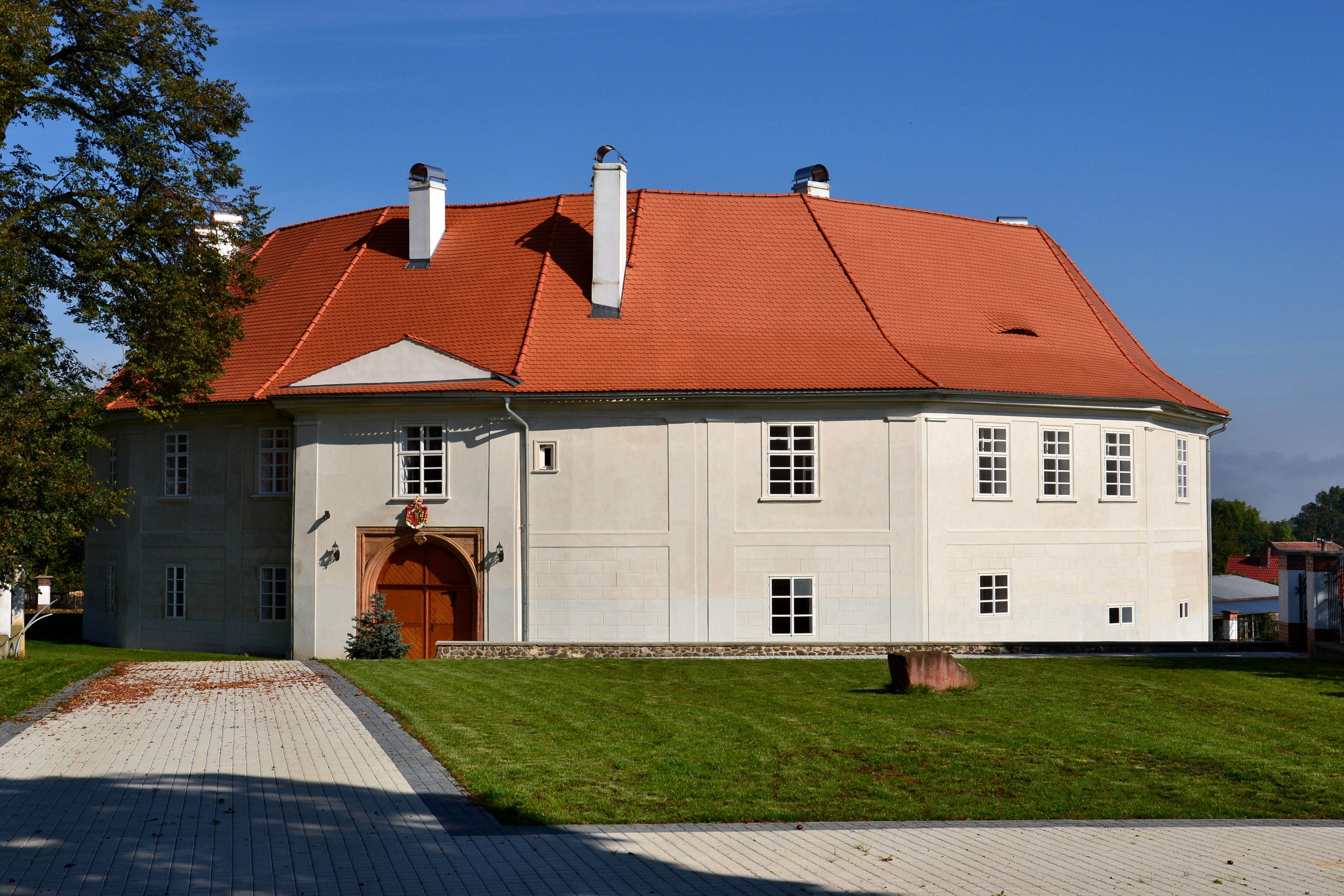 Vstupní strana zámku Památkový katalog MonumNet MIS hledat obrázky hledat seznamy